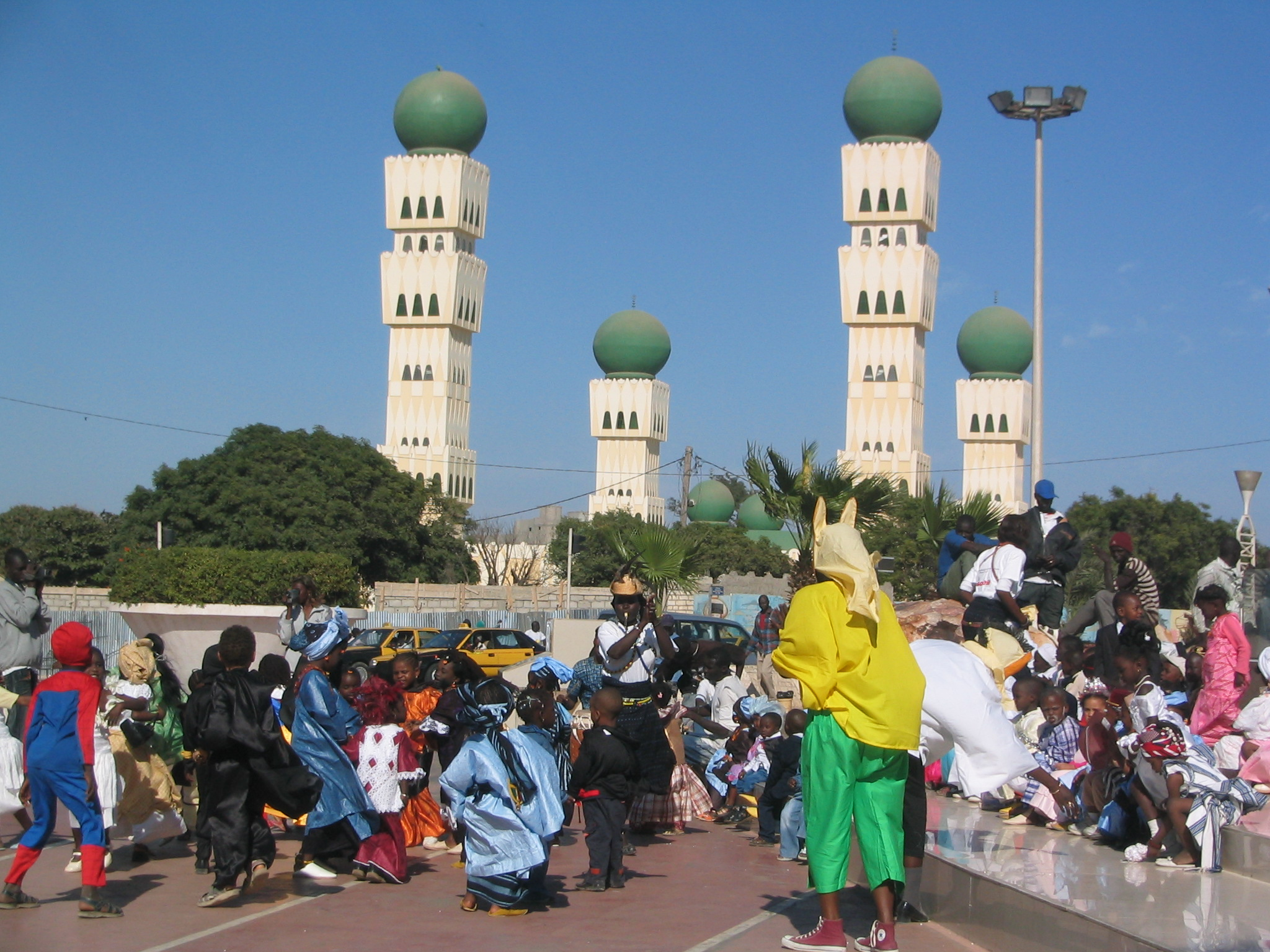 Ecole célébrant Mardi Gras devant la nouvelle mosquée de Dakar (Sénégal)